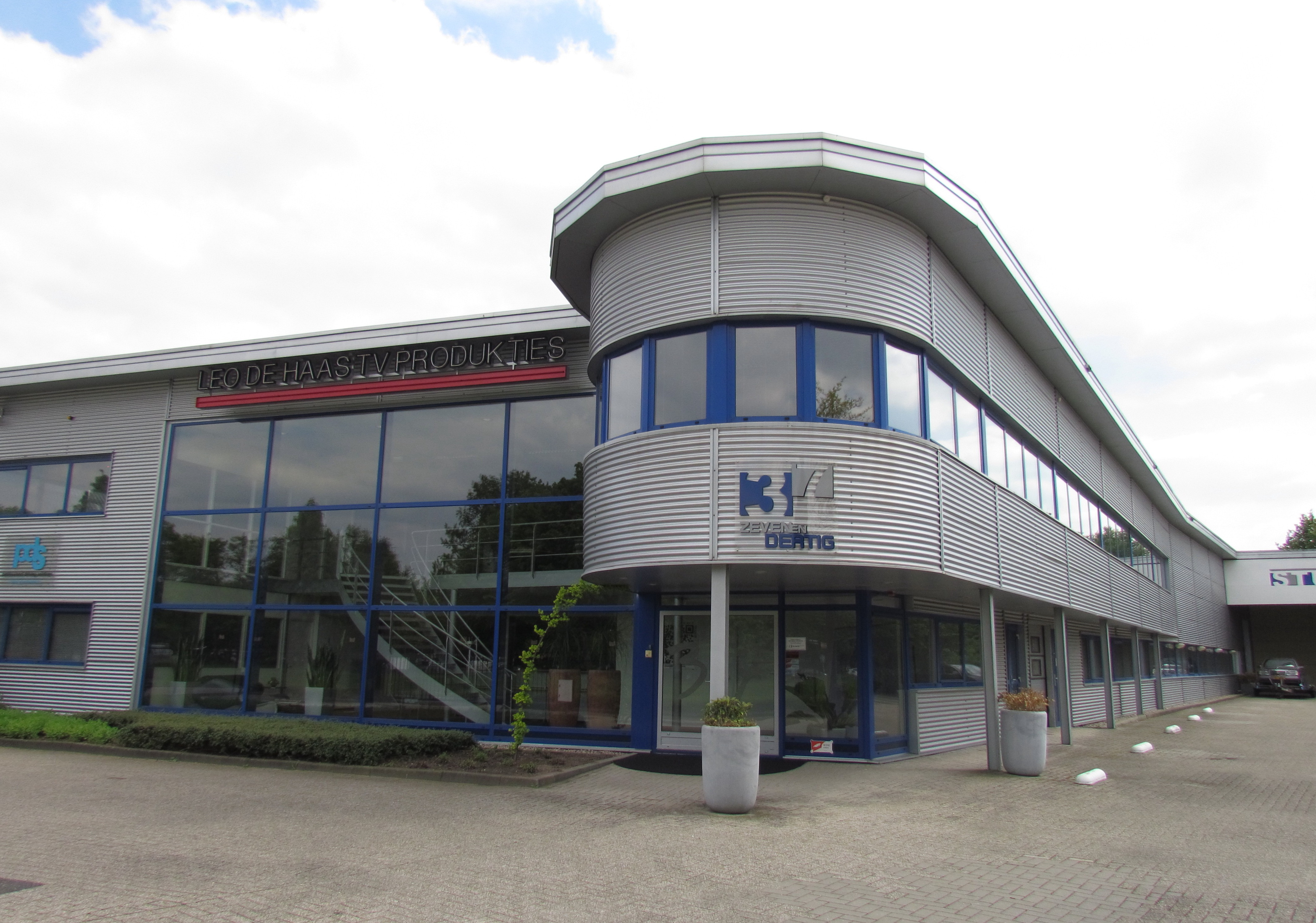 Gebouw van Leo de Haas TV Produkties B.V. op bedrijventerrein Malkenschoten, Apeldoorn-Zuid (NL)